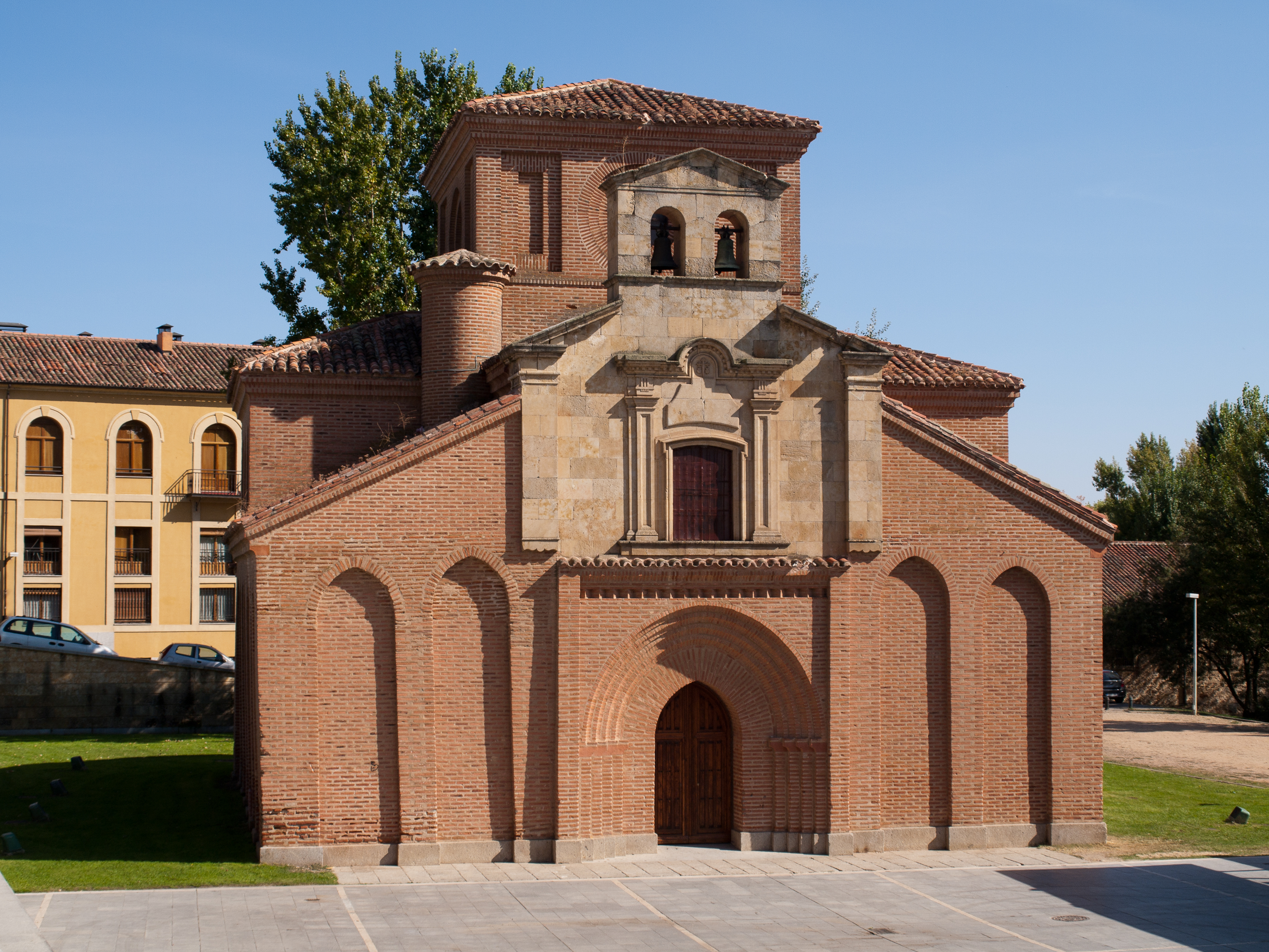 Fachada Iglesia de Santiago junto al Tormes